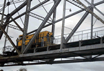 la máquina del tren bananero, cruzando el puente sobre el rio changuinola (Panama)